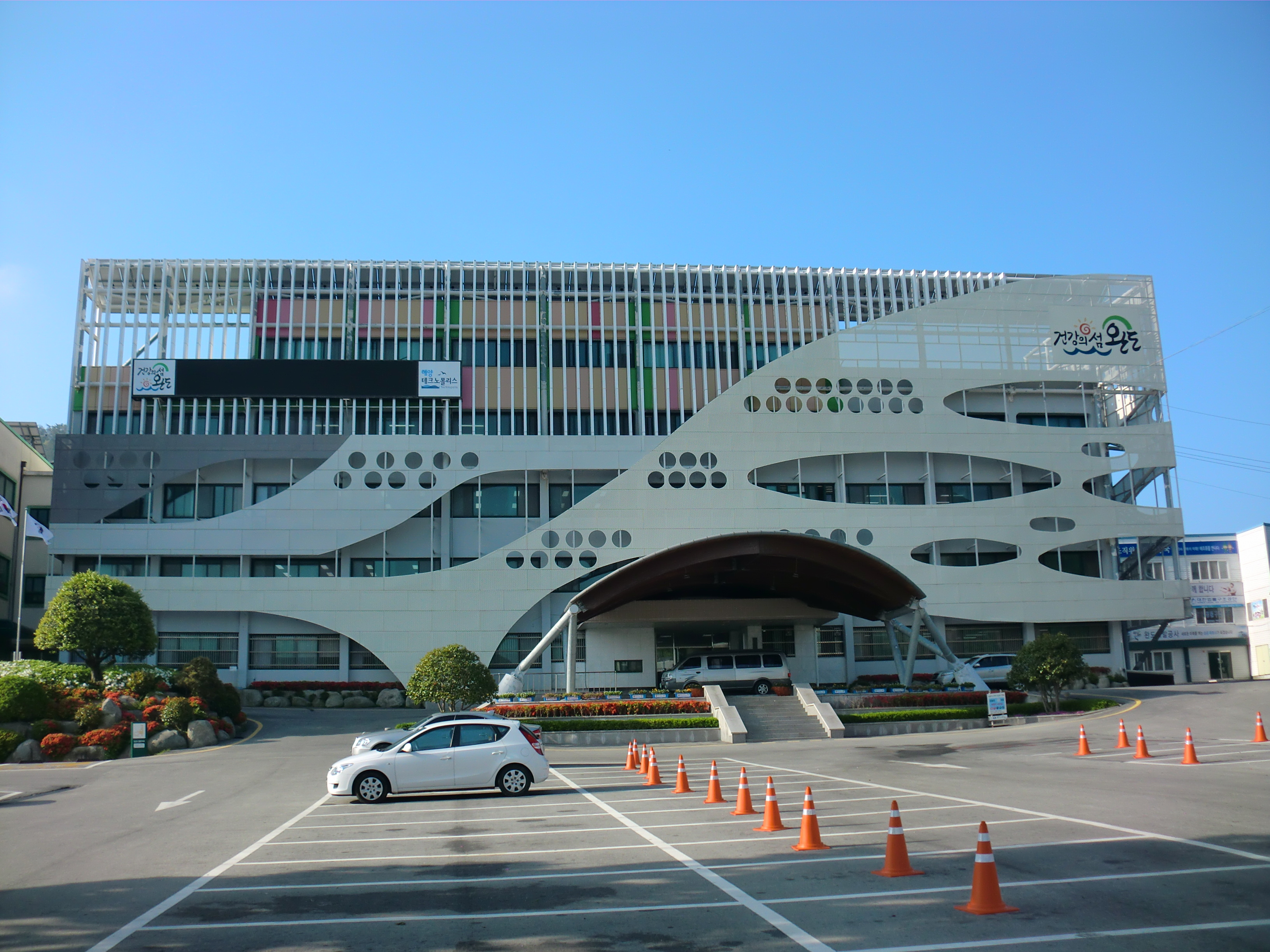 전라남도 완도군에 있는 완도군청